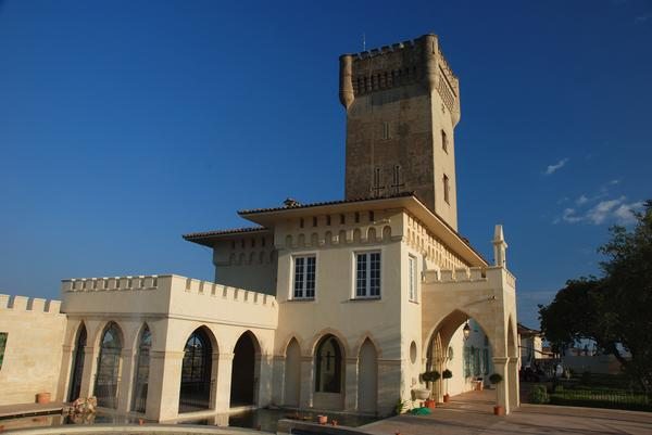 Château de Crémat